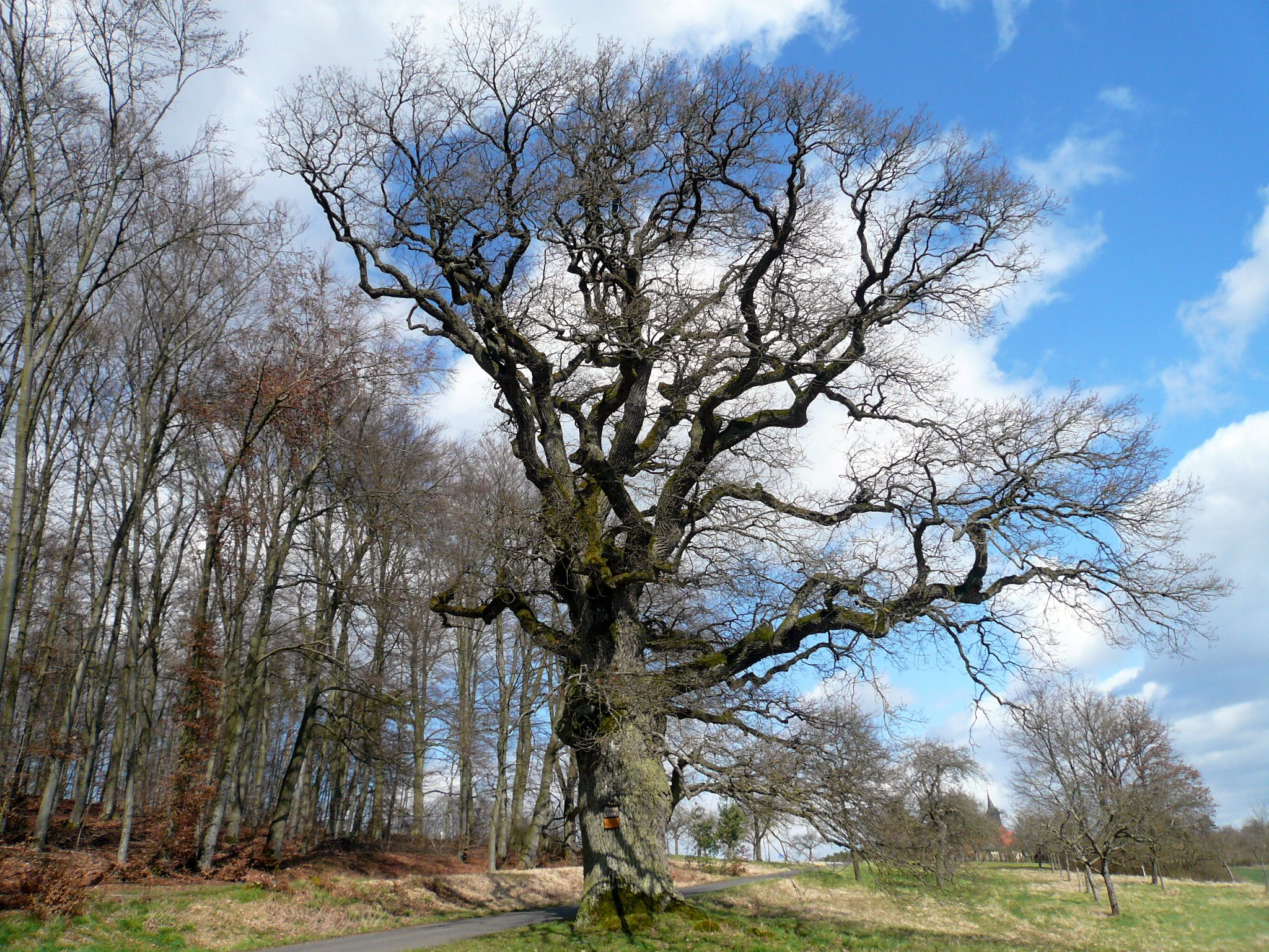 Römereiche bei Sulzthal